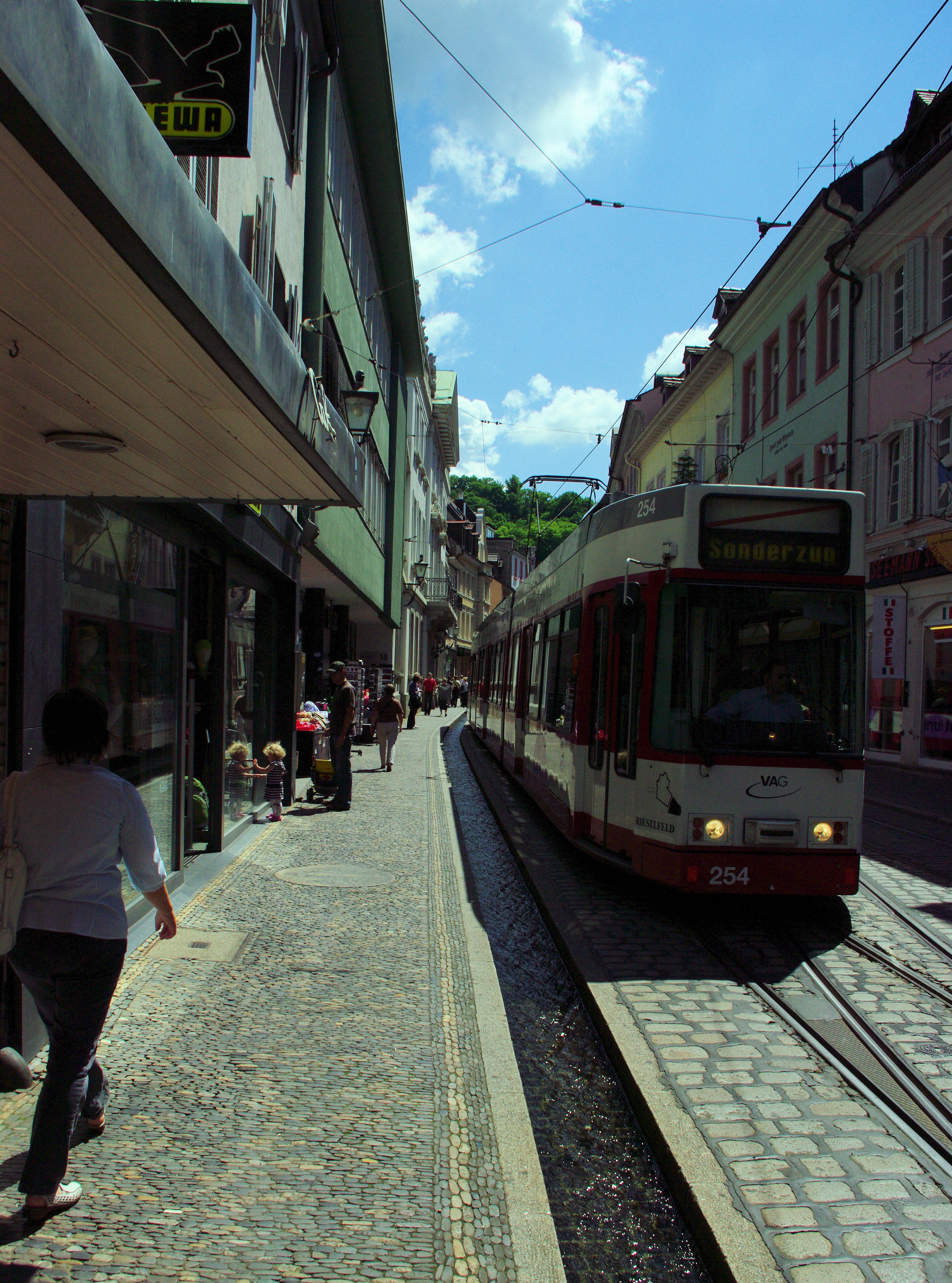 Die Freiburger Salzstraße mit Bächle und Straßenbahn